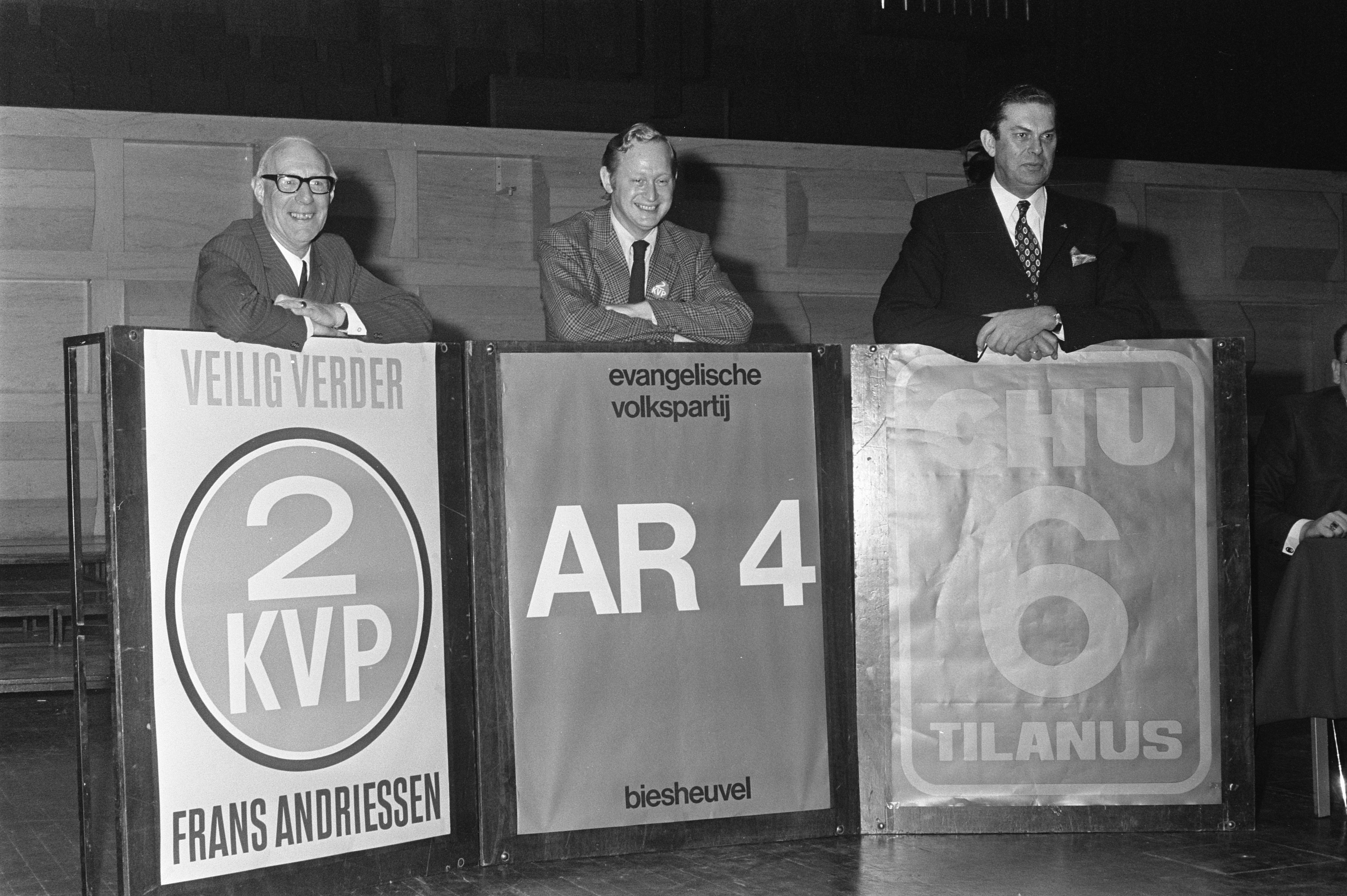 Collectie / Archief : Fotocollectie Anefo Reportage / Serie : [ onbekend ] Beschrijving : Verkiezingsbijeenkomst ARP, KVP, CHU in Rotterdam, achter de verkiezingsaffiches v.l.n.r. Tilanus, Andriessen en Biesheuvel Datum : 7 november 1972 Locatie : Rotterdam, Zuid-Holland Trefwoorden : AFFICHES, bijeenkomsten, verkiezingen Persoonsnaam : Andriessen Instellingsnaam : ARP, CHU Fotograaf : Verhoeff, Bert / Anefo Auteursrechthebbende : Nationaal Archief Materiaalsoort : Negatief (zwart/wit) Nummer archiefinventaris : bekijk toegang 2.24.01.05 Bestanddeelnummer : 926-0066